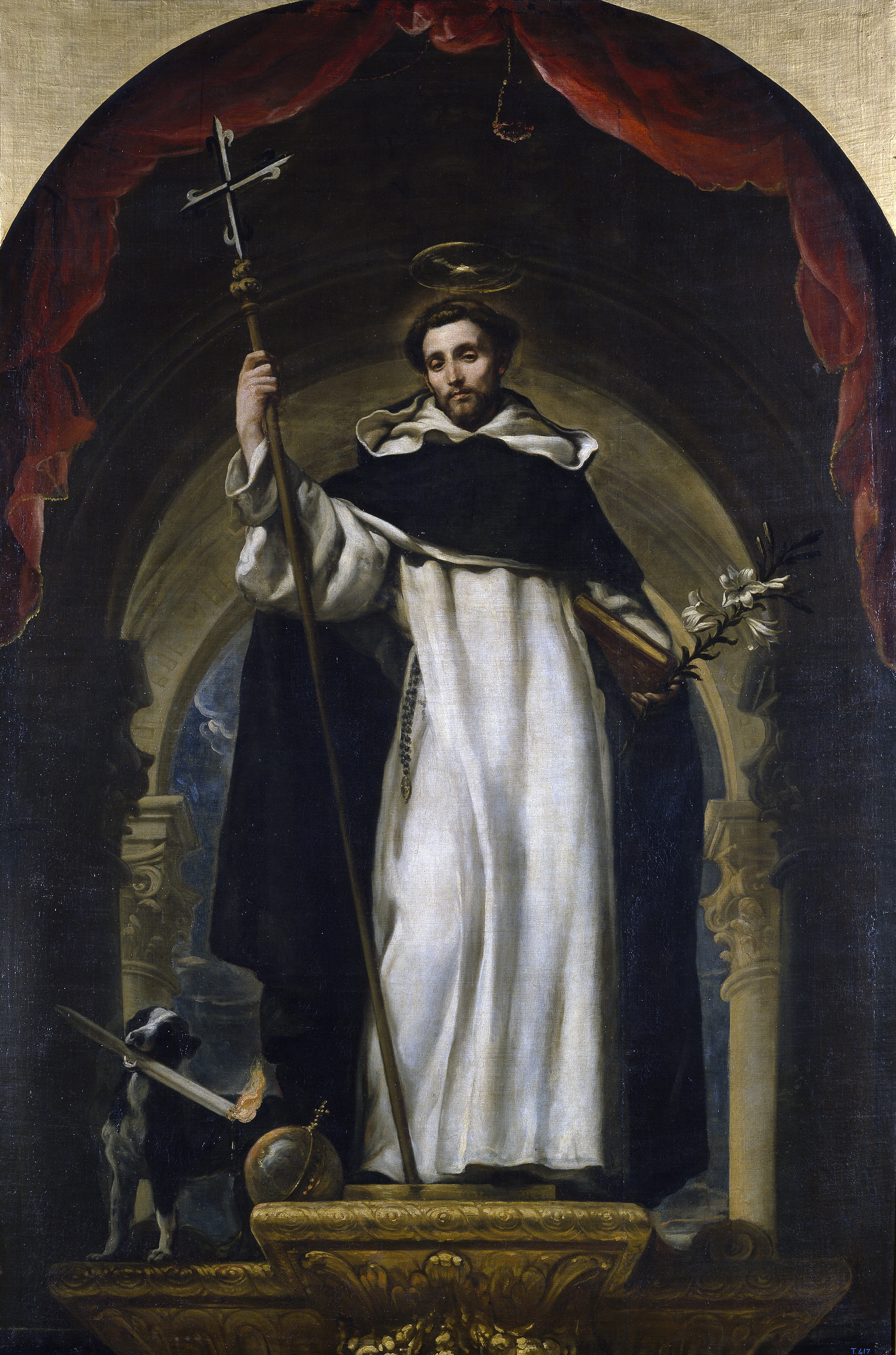 El lienzo representa al religioso español Santo Domingo de Guzmán, fundador de la Orden de los dominicos.